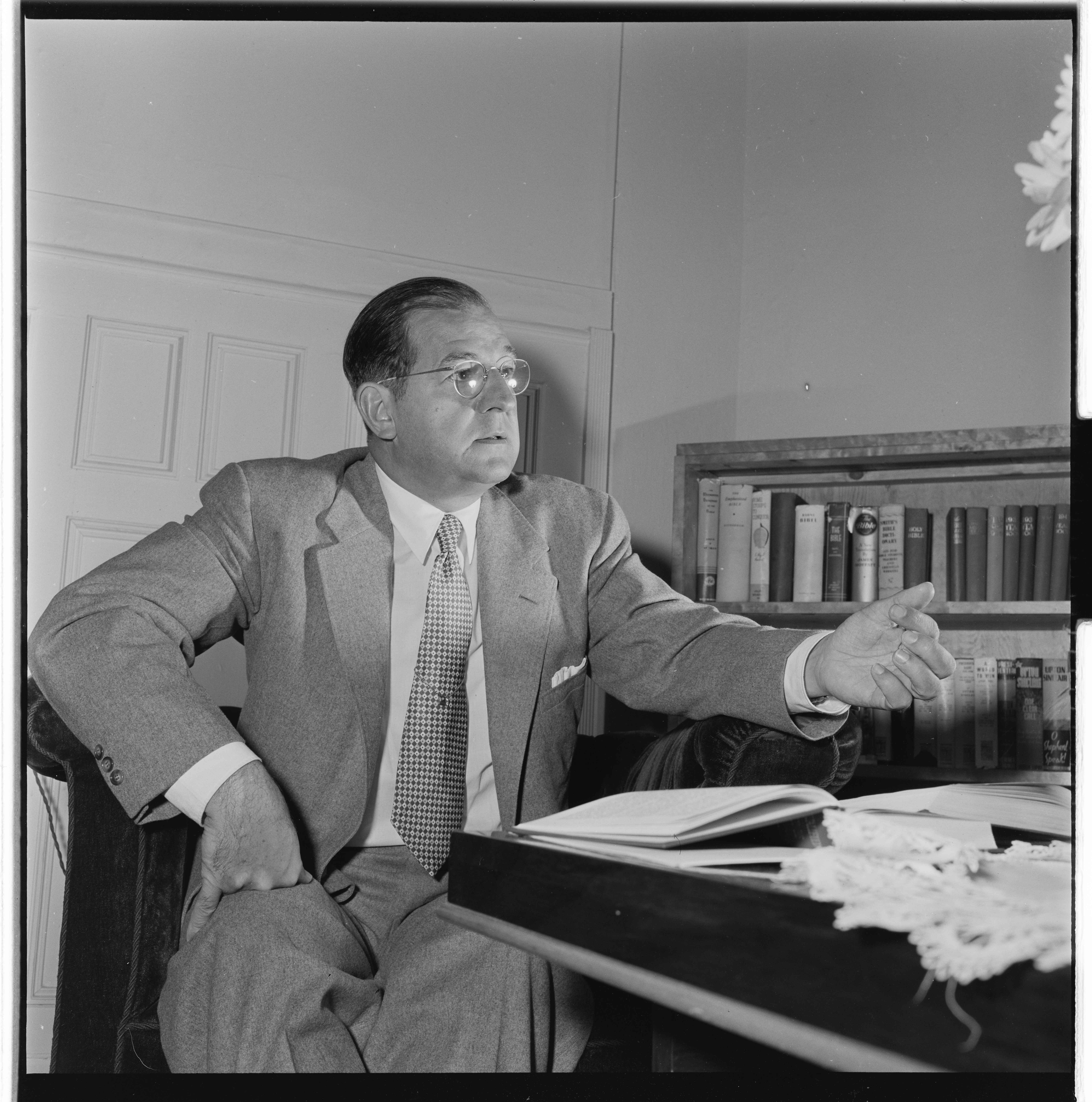 Bildet er hentet fra Arkivverket. Nathan Knorr, Jehovas vitne.NÅ nr. 38,1955 Arkivinstitusjon : Riksarkivet Arkivnavn : Billedbladet NÅ Sted : Norge, Ukjent, Ukjent, Emneord: portrett, mann, Jehovas vitner Avbildet: Knorr, Nathan Homer